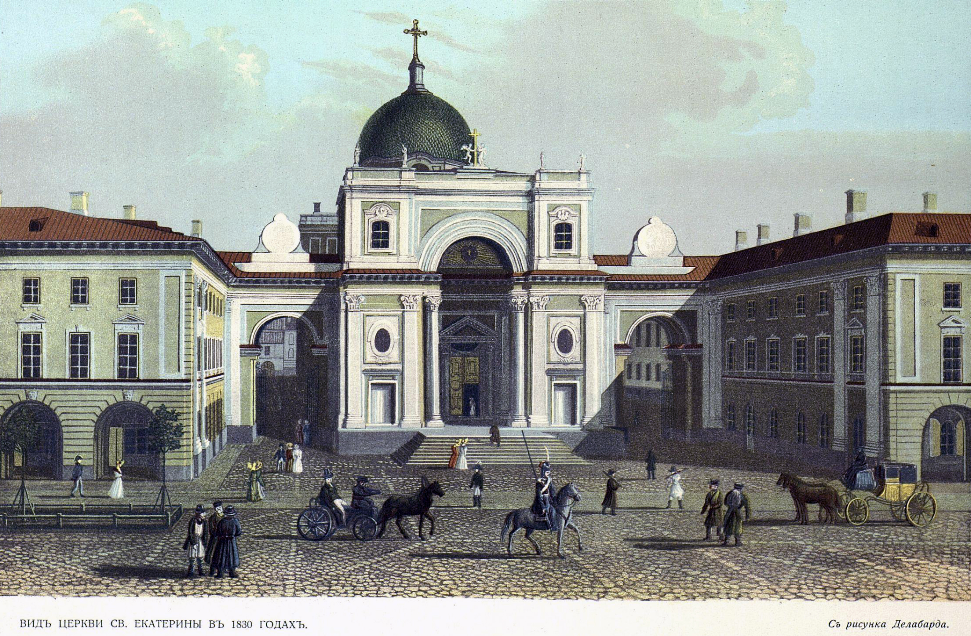 Базилика Святой Екатерины Александрийской, 1830, Санкт-Петербург